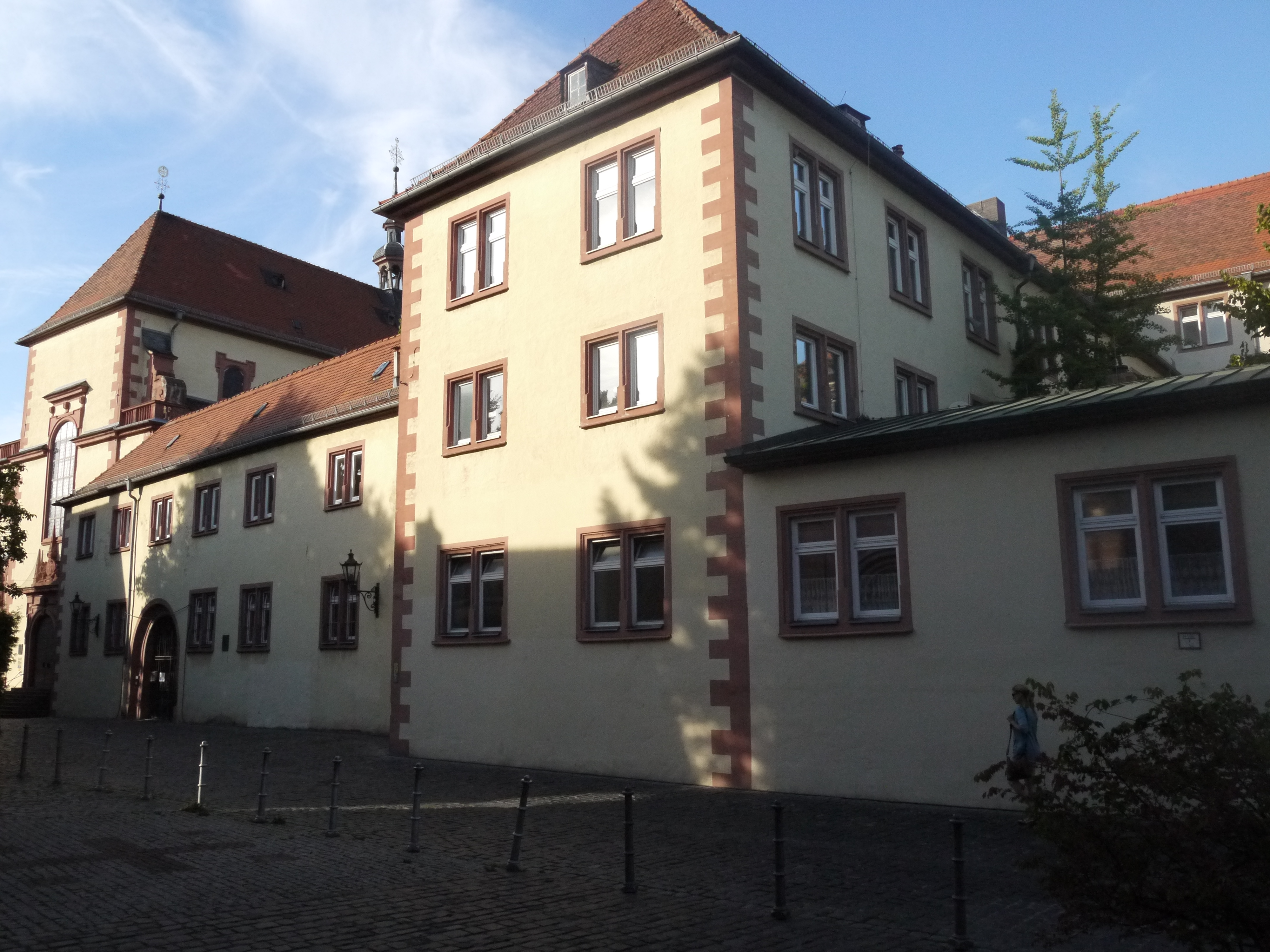 Pfaffengasse 24 und 26, ehemaliges Jesuitenkolleg, in Aschaffenburg (denkmalgeschützt)